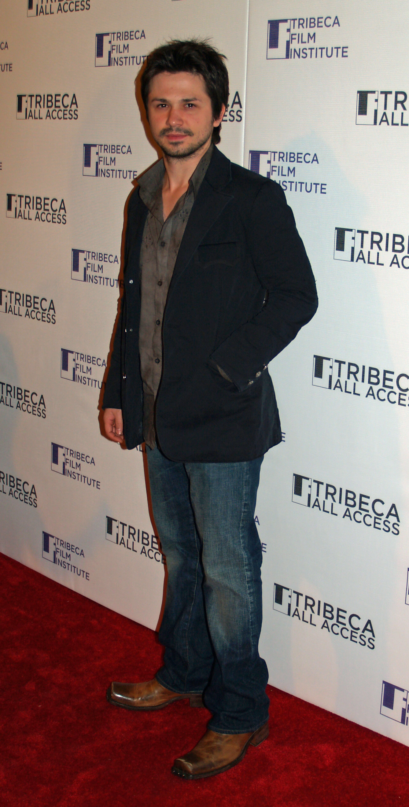 Freddy Rodriguez